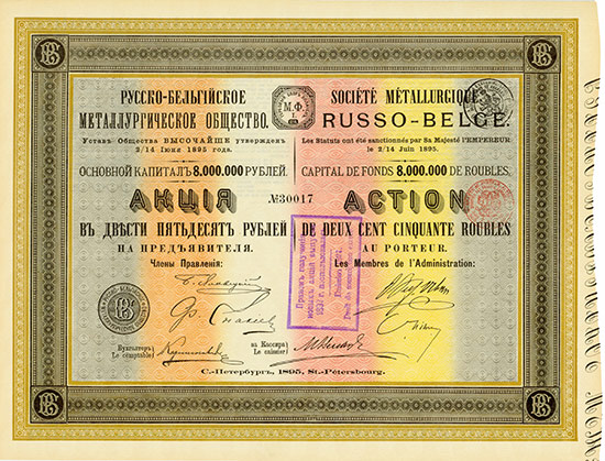 Акция Русско-Бельгийского металлургического общества